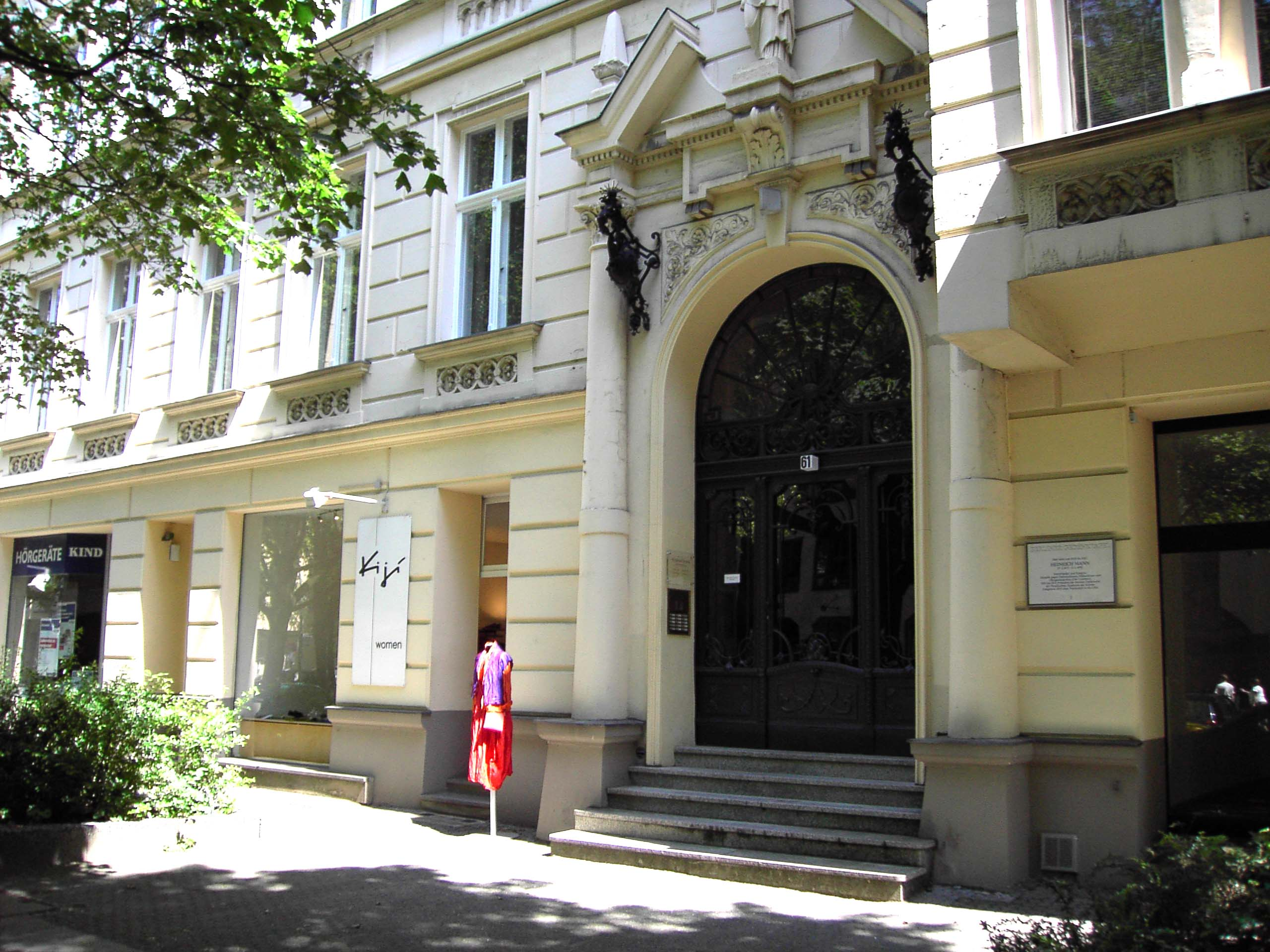 Wohnhaus Heinrich Manns, Fasanenstraße 61, Berlin-Wilmersdorf